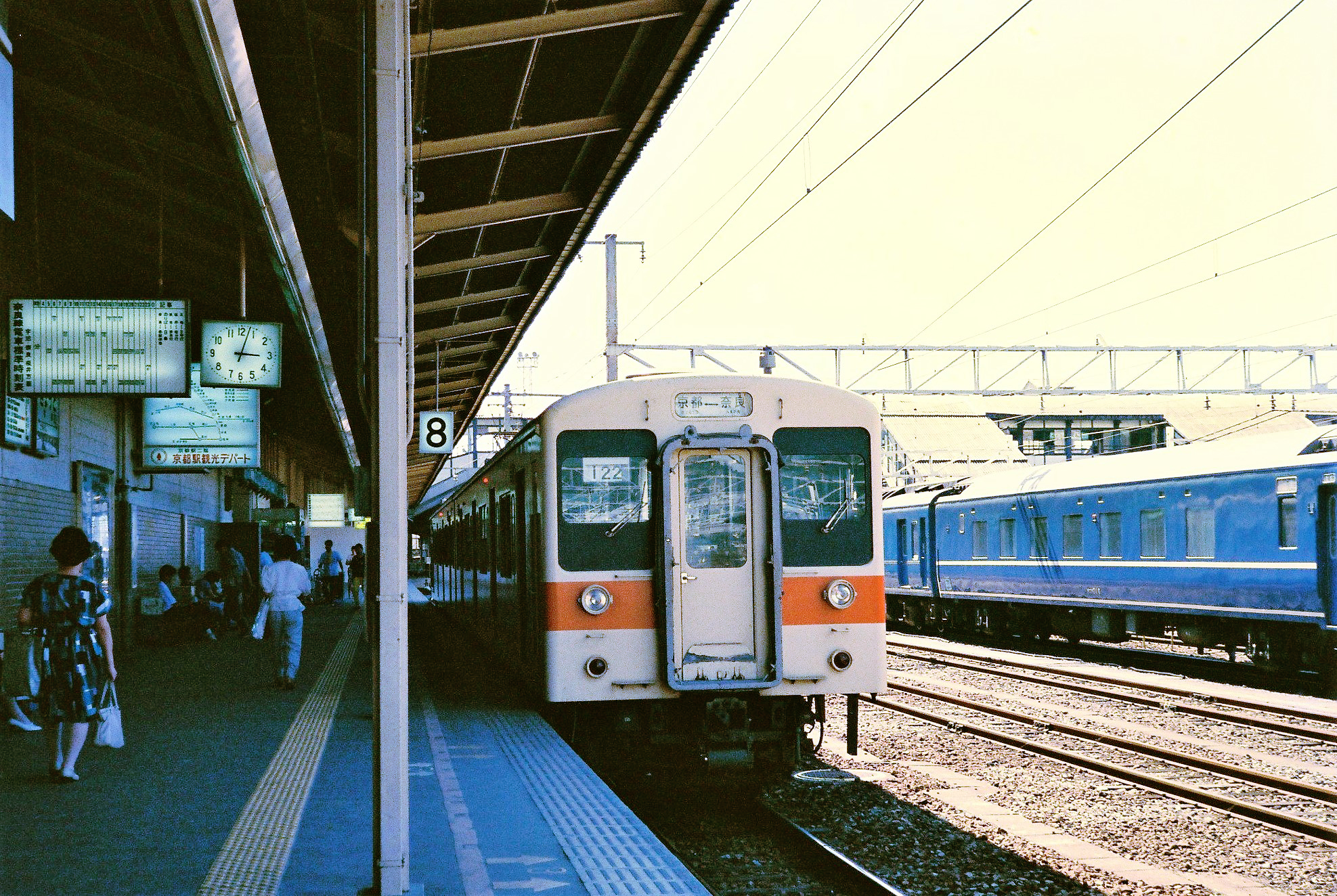 京都駅8番線に停車中の奈良線105系電車（1987年8月撮影）